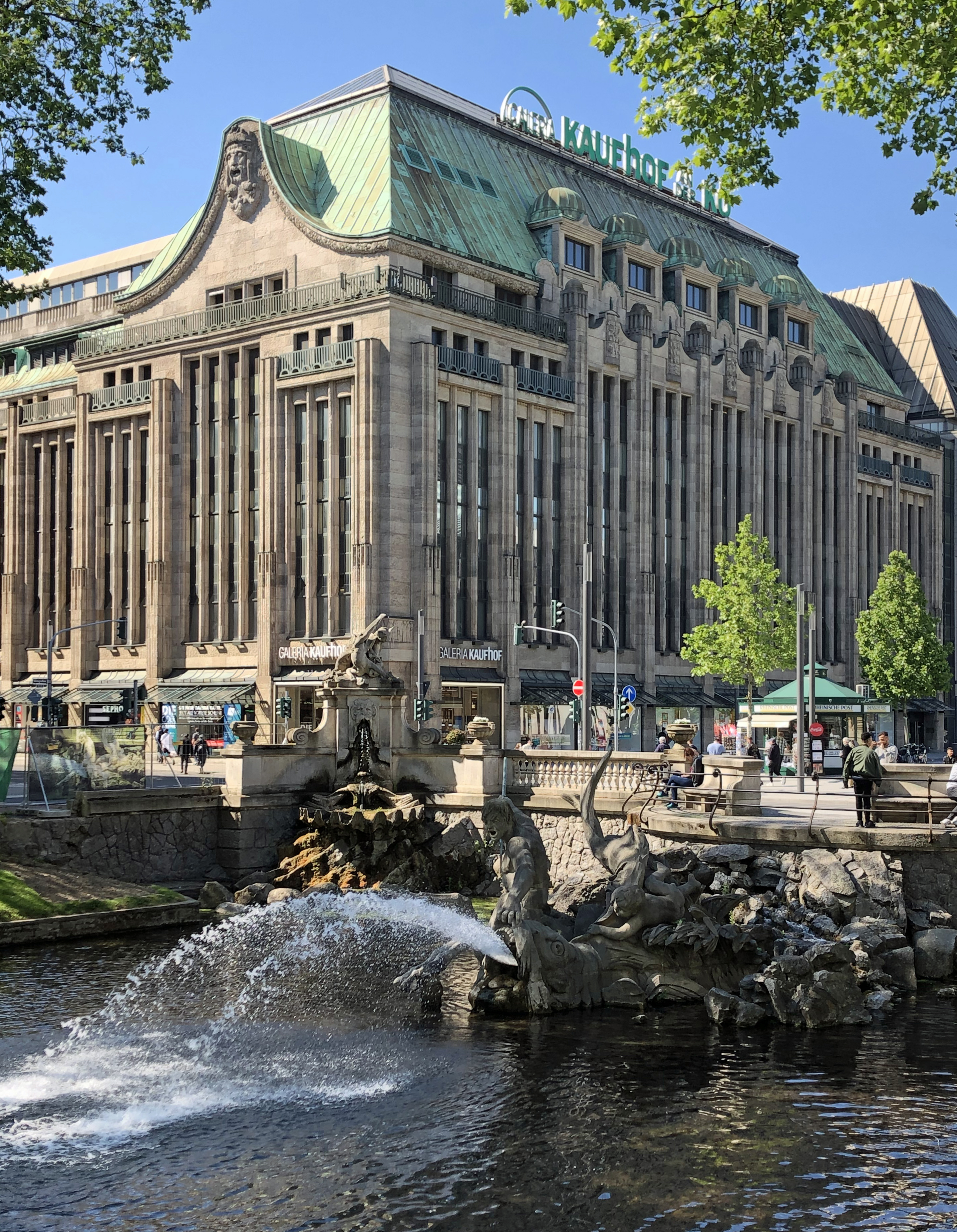 Tritonenbrunnen am Stadtgraben und Kaufhof an der Königsallee Düsseldorf